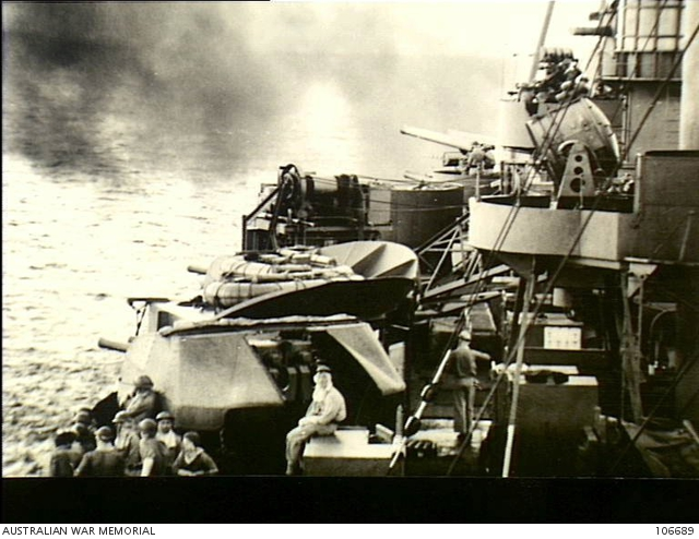 DUTCH NEW GUINEA. 1944-05-16. HMAS SHROPSHIRE BOMBARDING SAWAR AIRSTRIP.